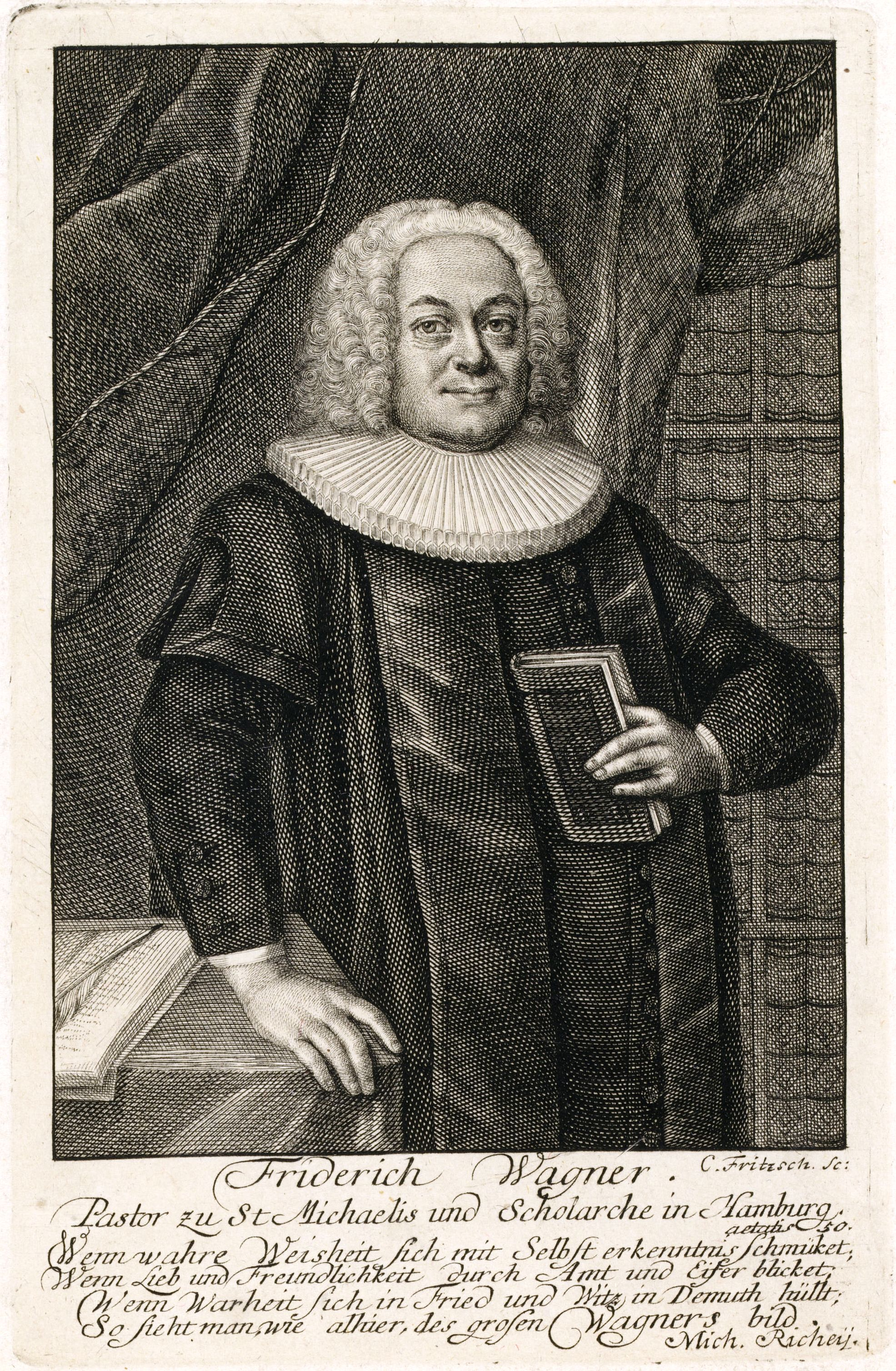 Friderich Wagner